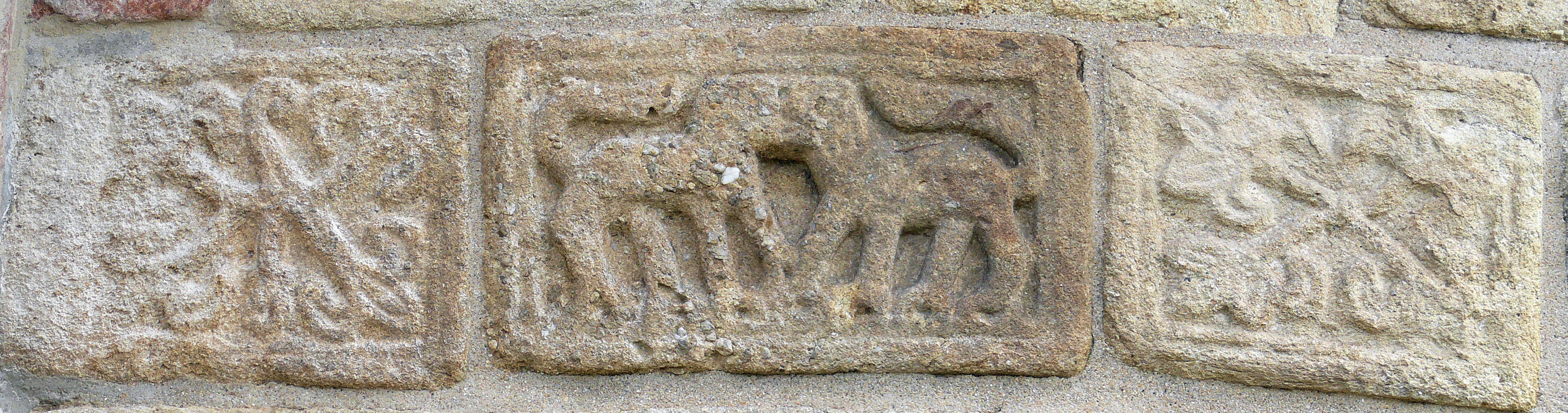 Saint-Romain-le-Puy - Eglise du prieuré - Pierres sculptées encastrées dans le chevet